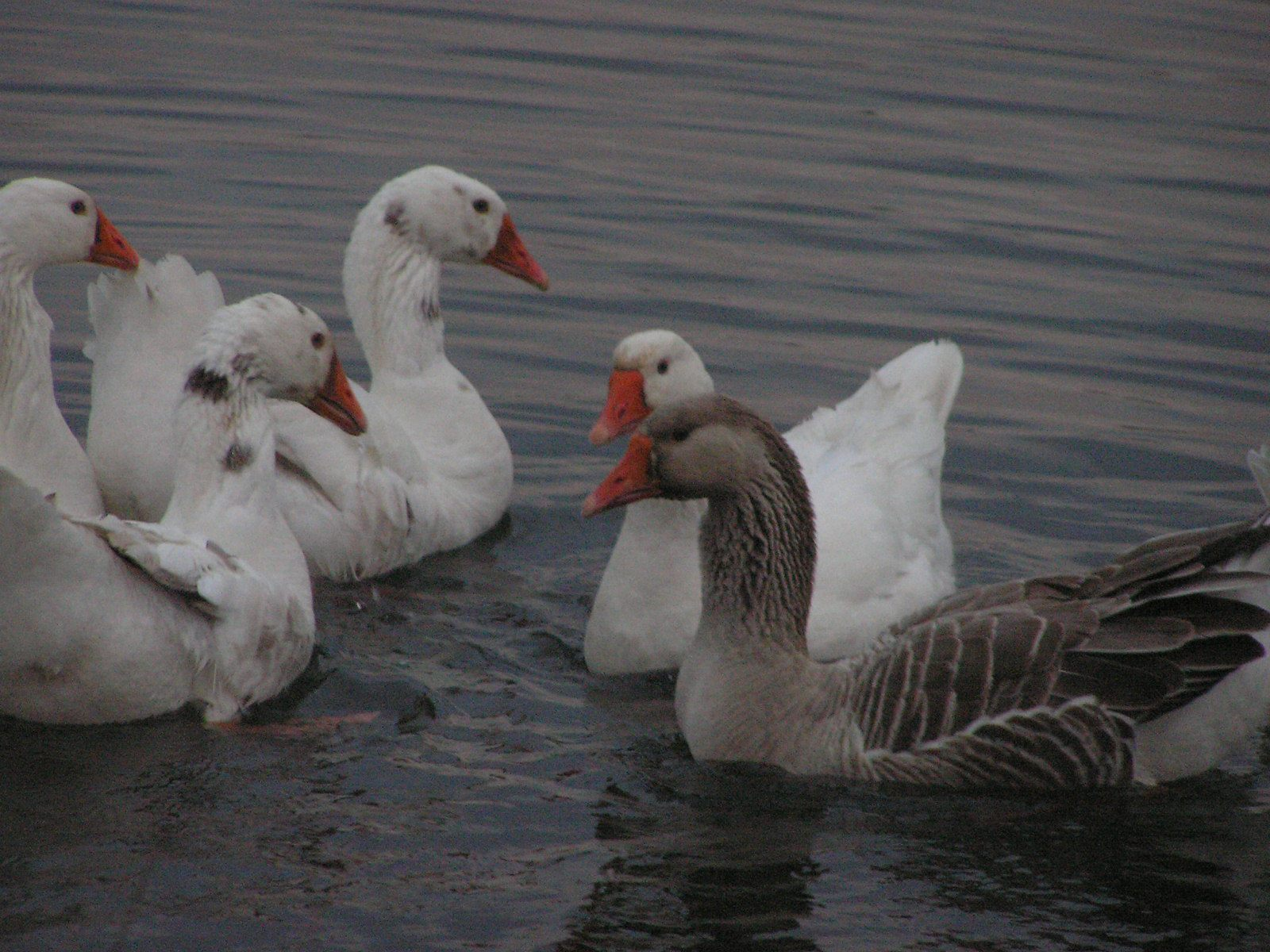 Ocas no encoro de Cecebre (Galiza, España).